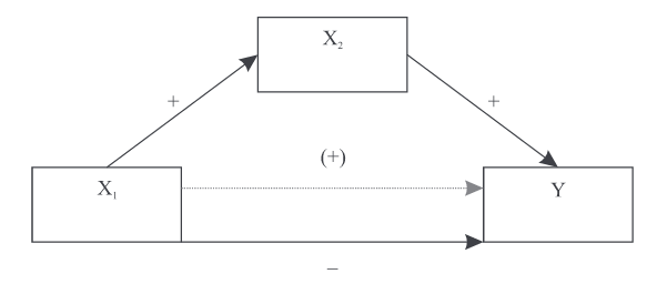 Supresja